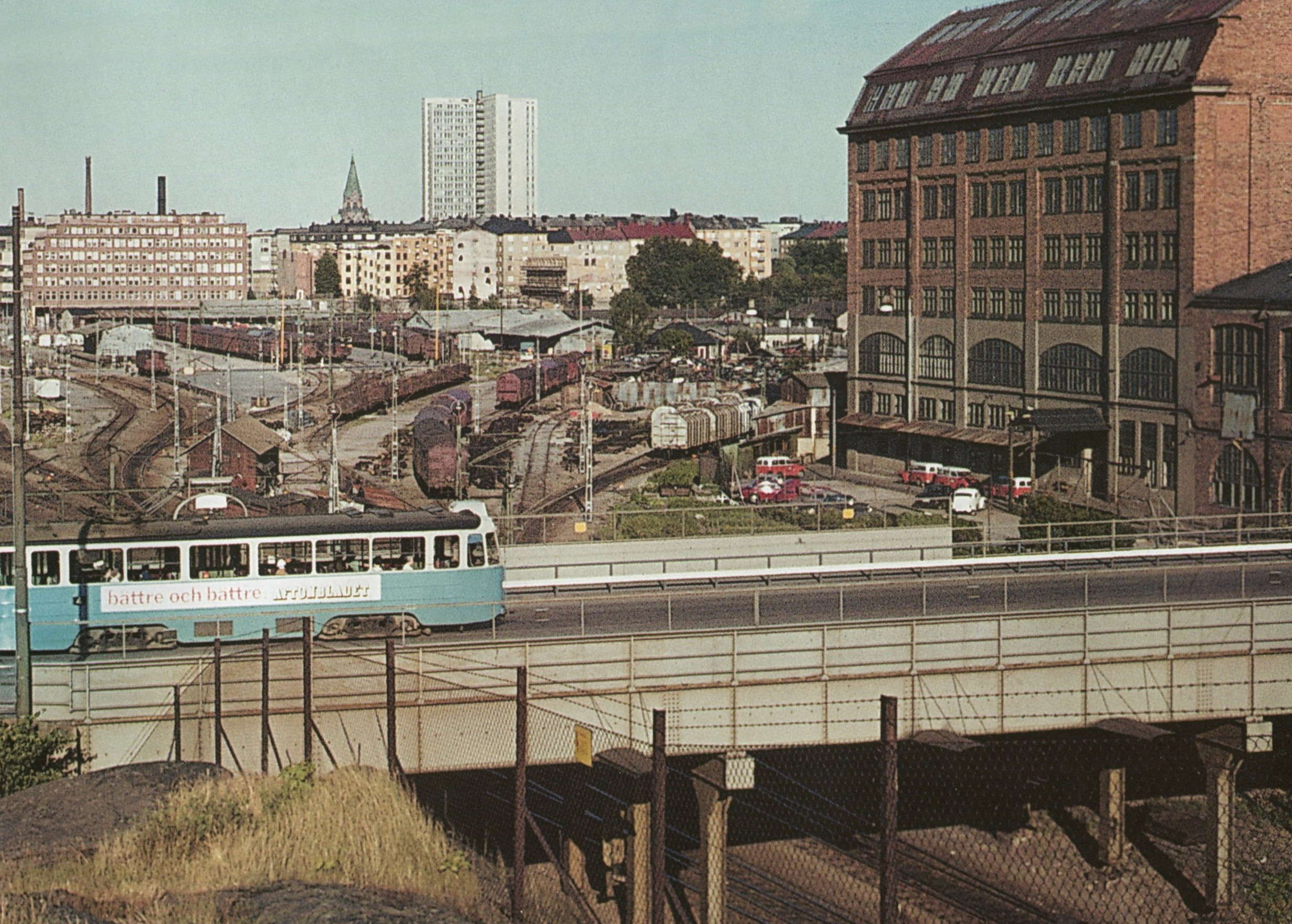 Södra stationsområdet. Rosenlundsgatans viadukt över stambanan